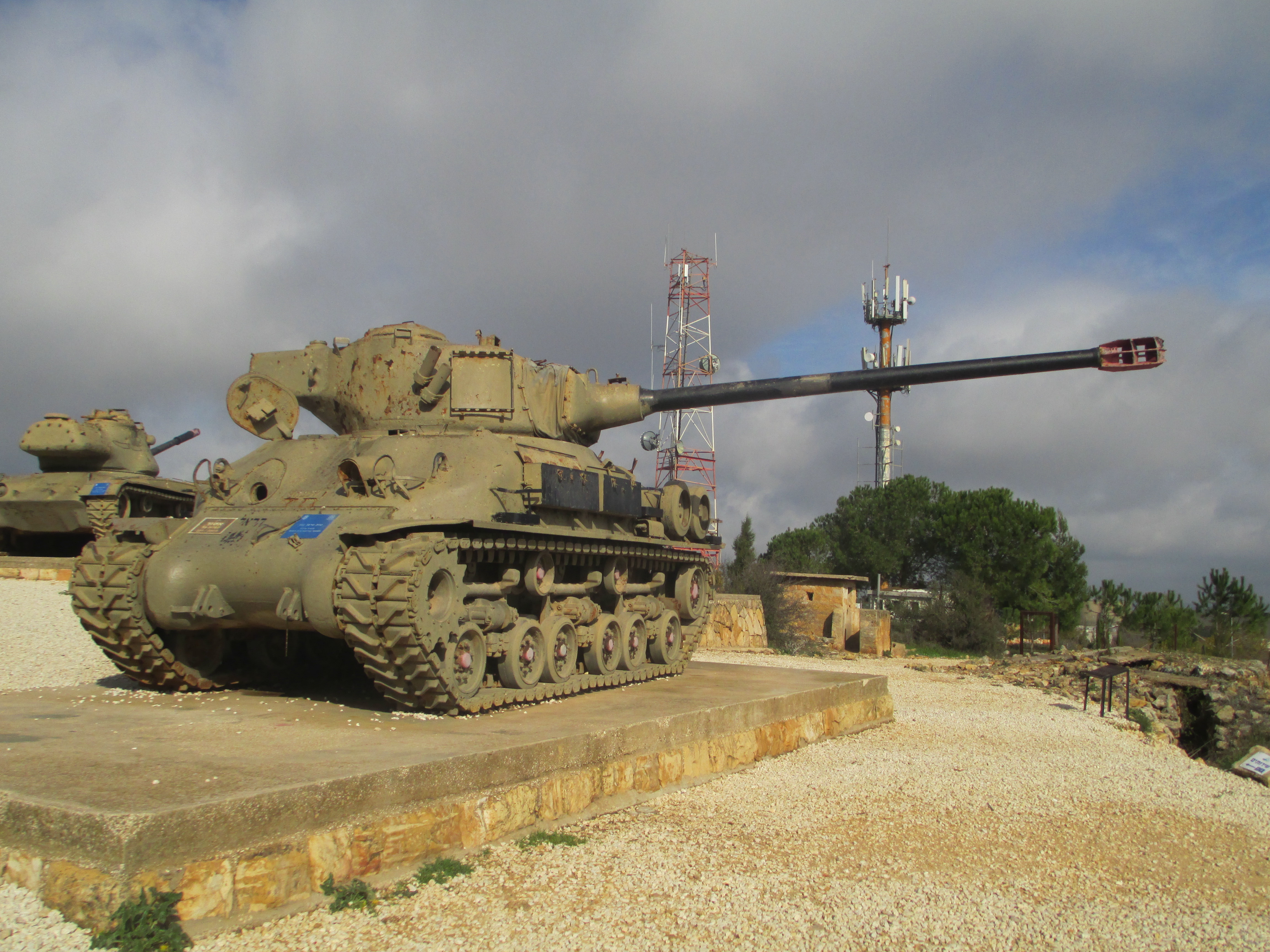 טנק שרמן M-50 בגבעת הרדאר